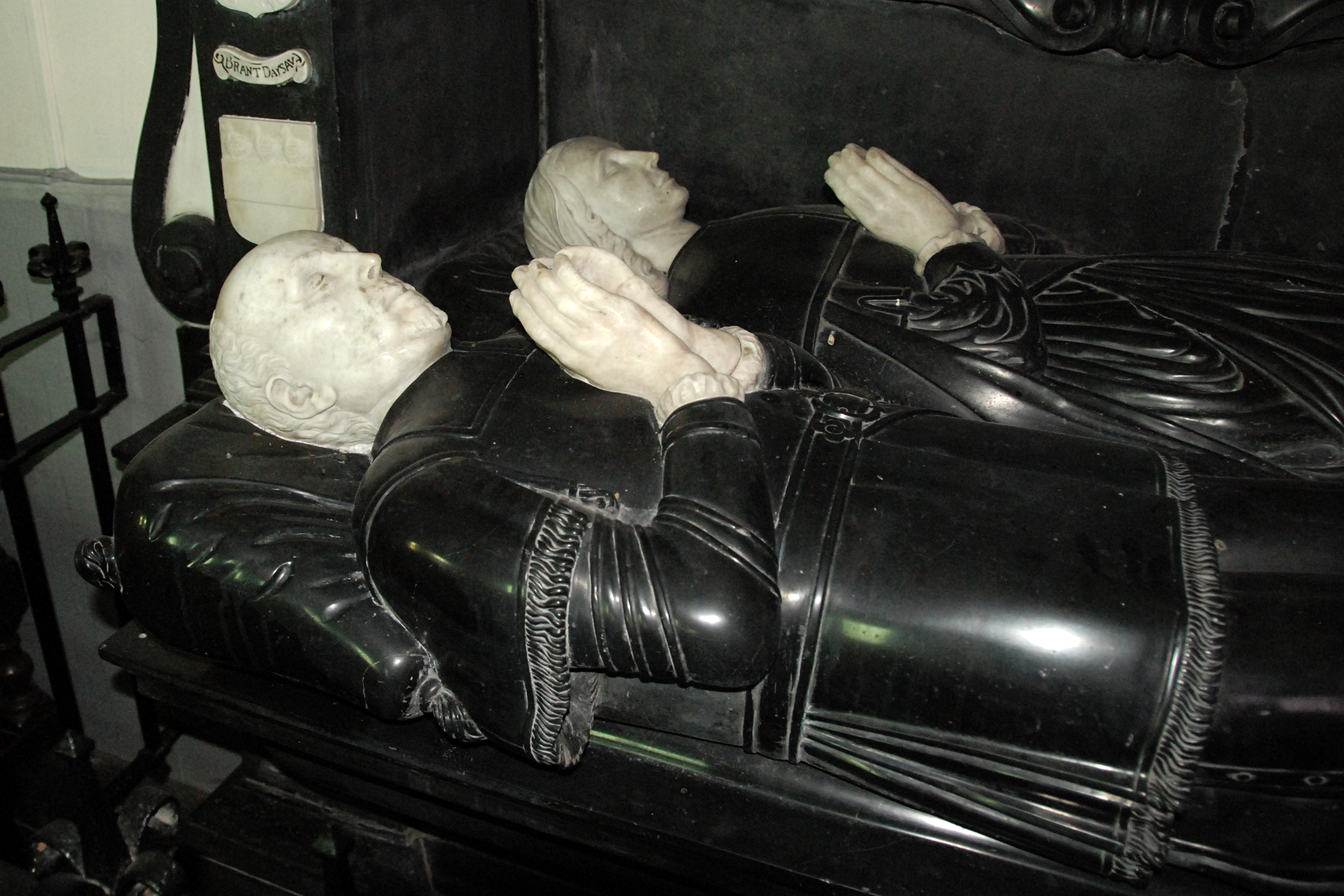 Belgique - Brabant wallon - Église de Court-Saint-Étienne - Enfeu de Louis de Provins